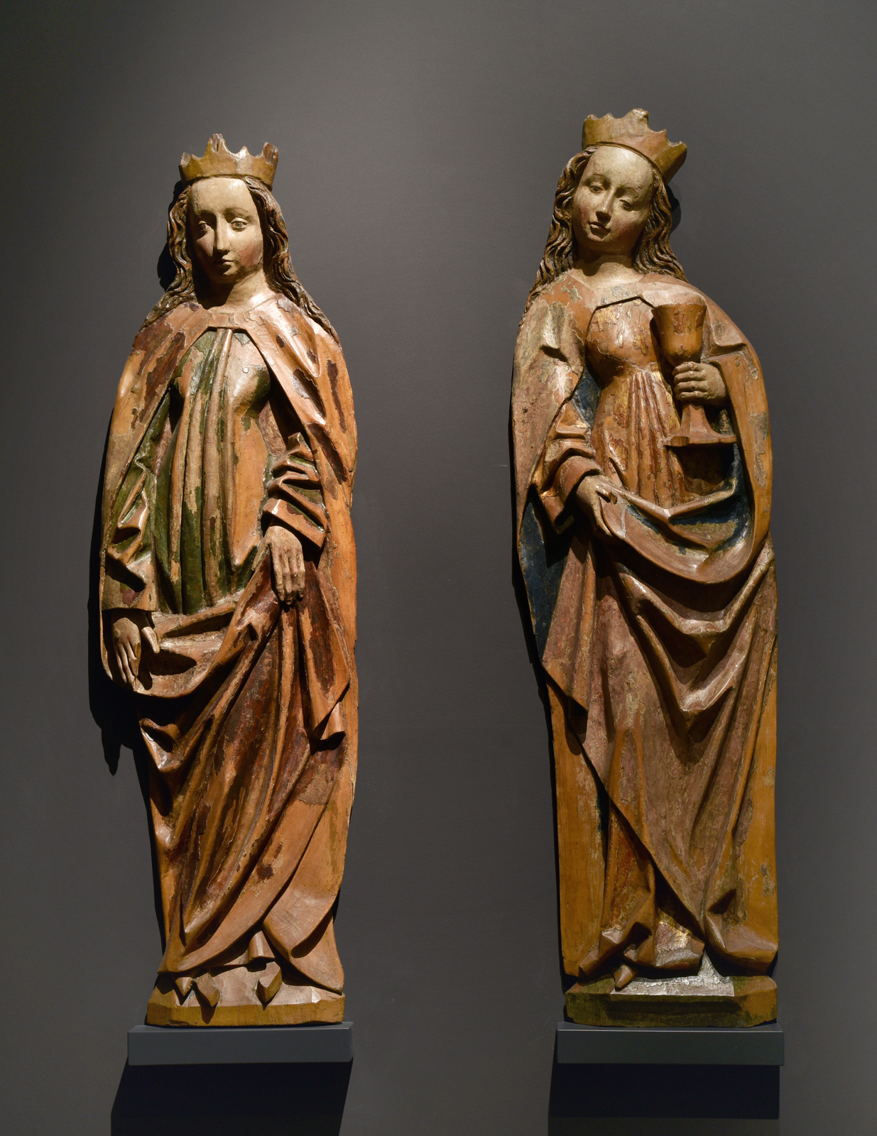 Světice z Teplé (kolem r. 1500), expozice Galerie výtvarného umění v Chebu